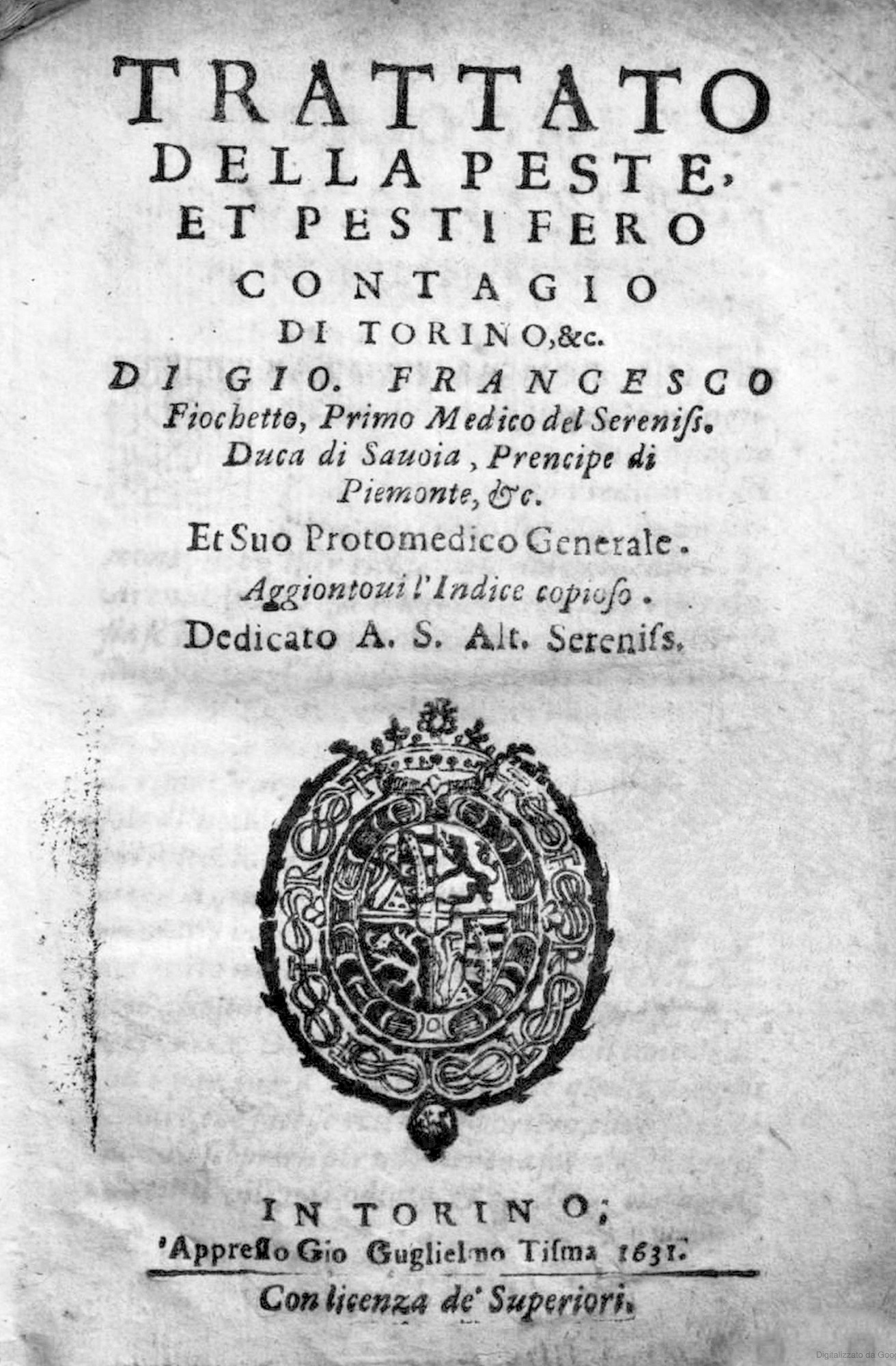 Frontespizio del Trattato relativo alla peste di Torino del 1630-1631